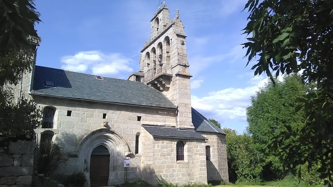 Église Saint-Julien de Blavignac (Lozère).